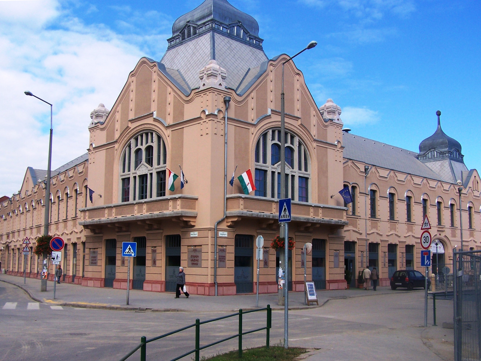 Községháza (Gödöllő, Szabadság tér 10., Dózsa György út 2.)